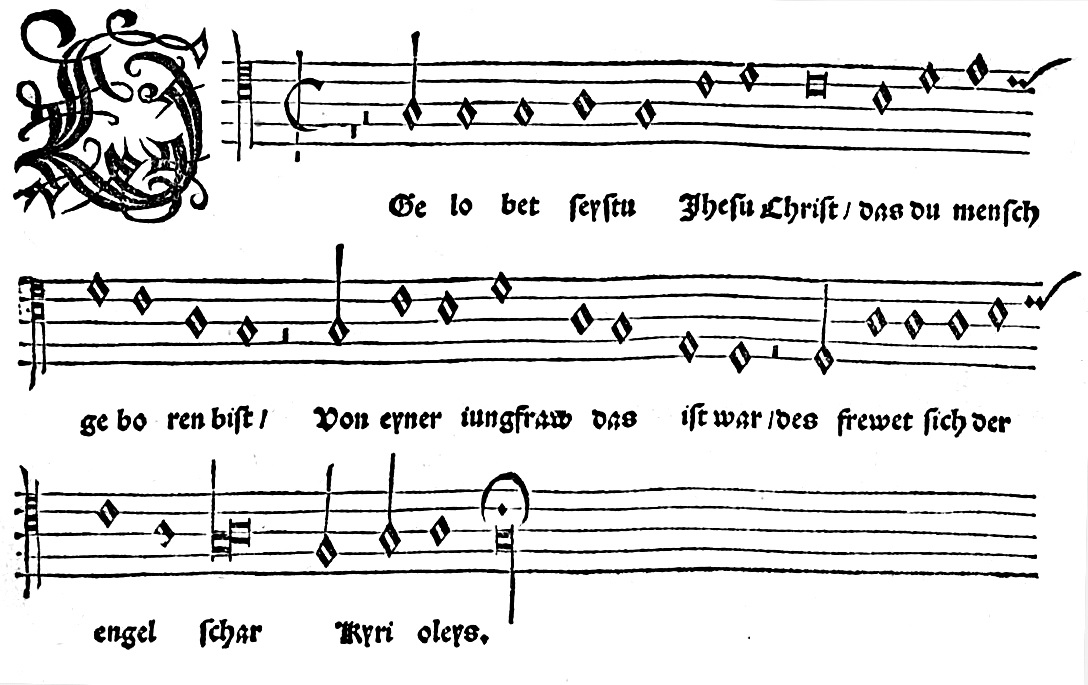 Gregorian plain chant from Geystliche gesangk Buchleyn (1524) by Johann Walter: No. XXII "Gelobet seist du, Jesu Christ".